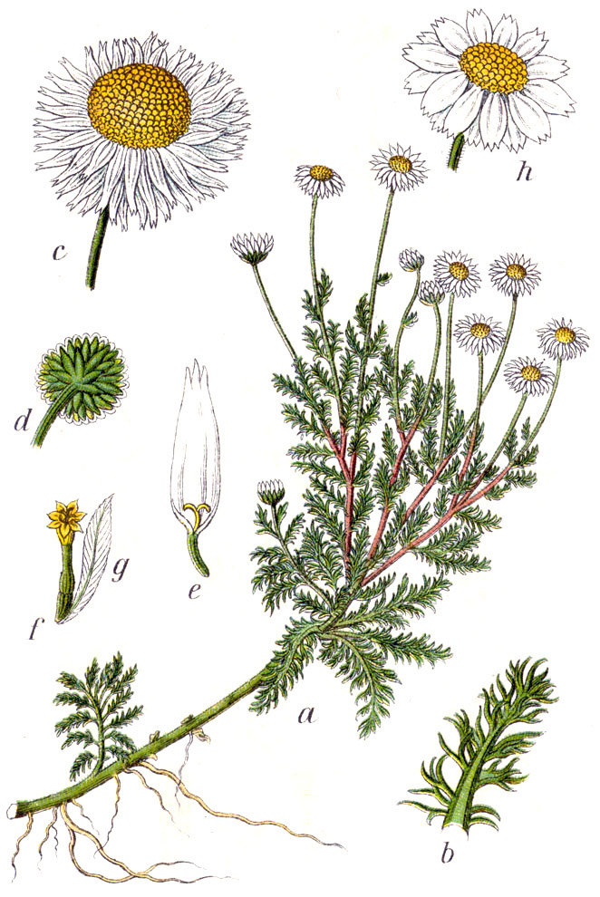 FloraWeb.de: Römische Kamille, Chamaemelum nobile (L.) All. Original Caption Römische Kamille, Chamaemelum nobile